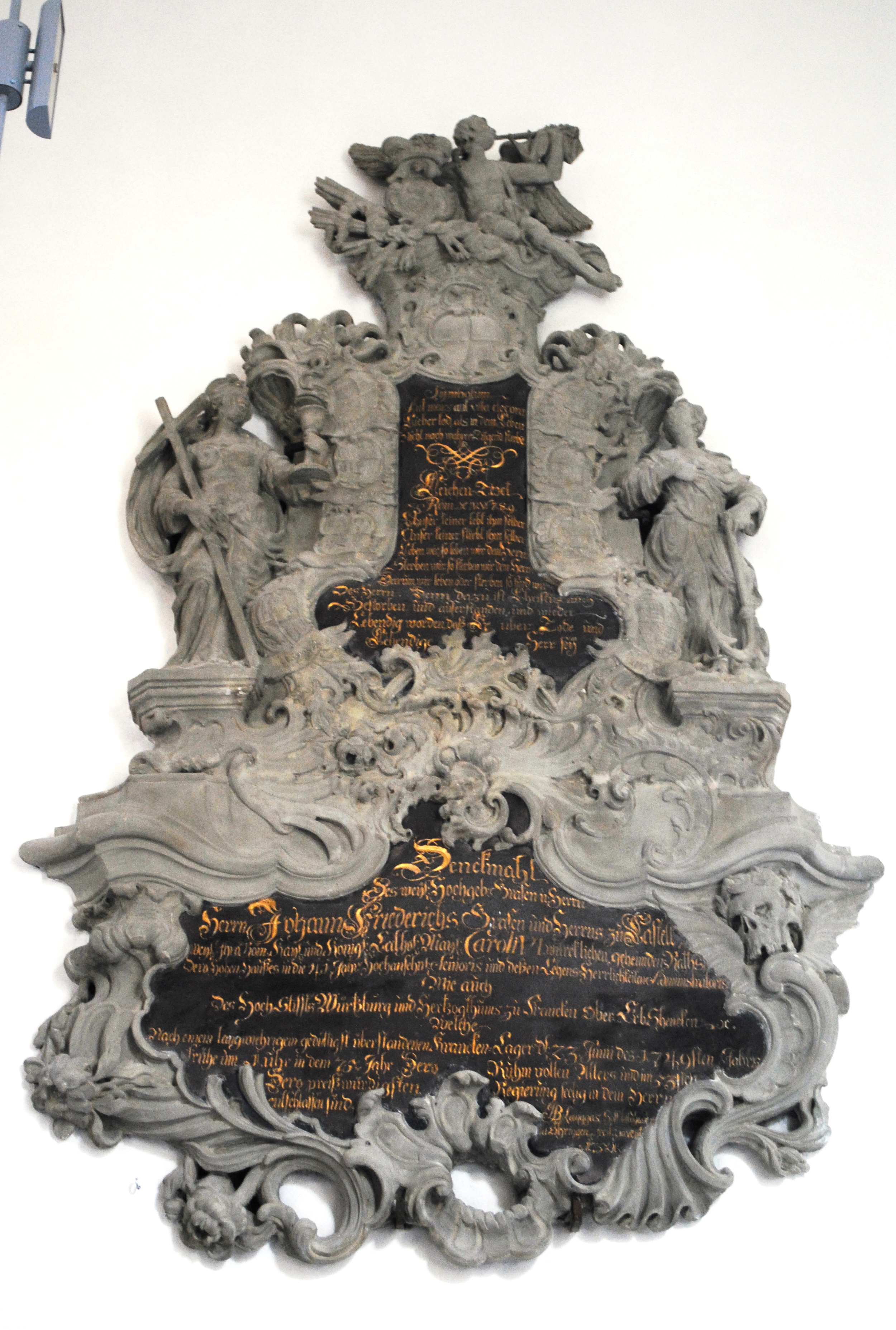 Kirche Rüdenhausen, innen, Epitaph des Grafen Johann Friedrich Graf von Castell-Rüdenhausen (1675–1749) This is a photograph of an architectural monument.